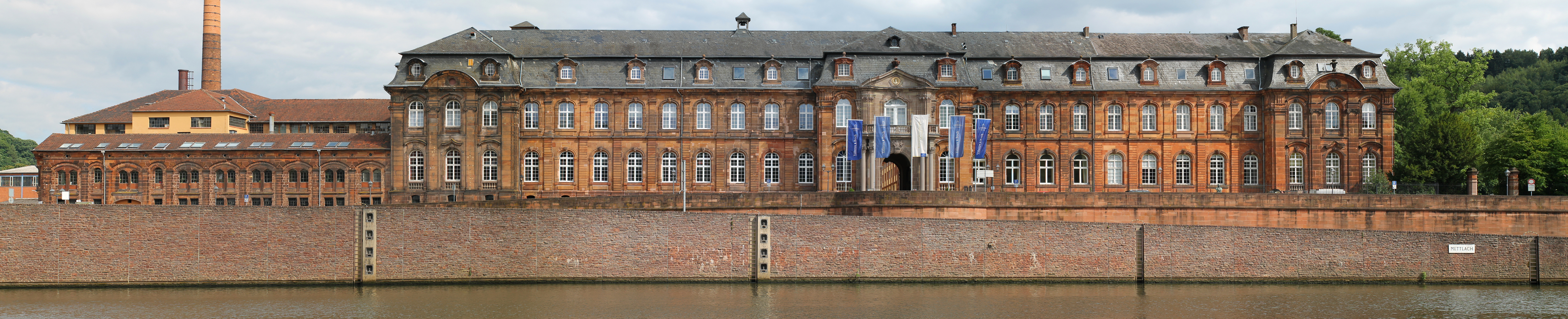 Das Verwaltungsgebäude von Villeroy & Boch in Mettlach.